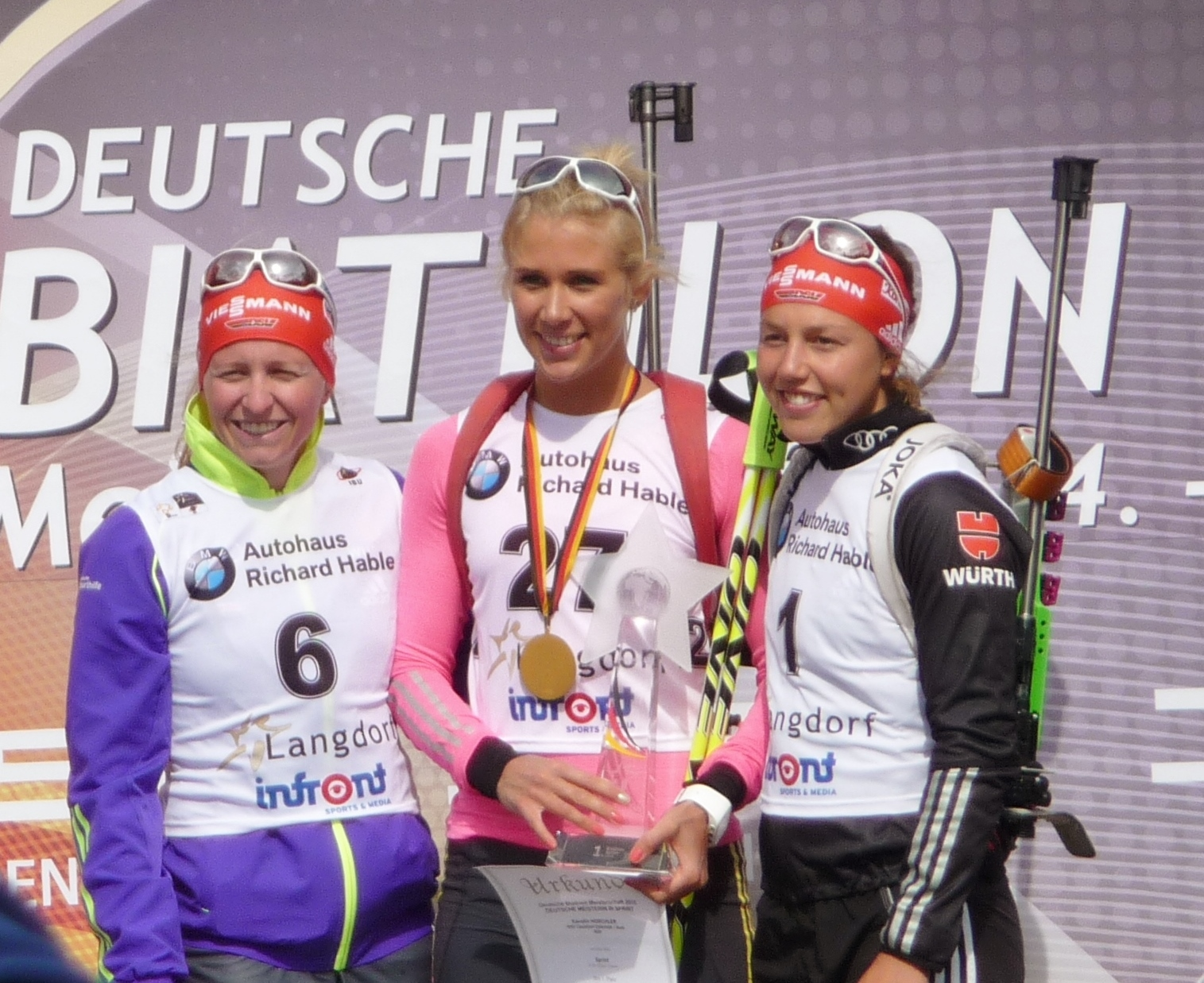 Siegerehrung im Sprint der Frauen bei der Deutschen Biathlon-Meisterschaft 2015. Von links: Franziska Hildebrand, Karolin Horchler, Laura Dahlmeier.